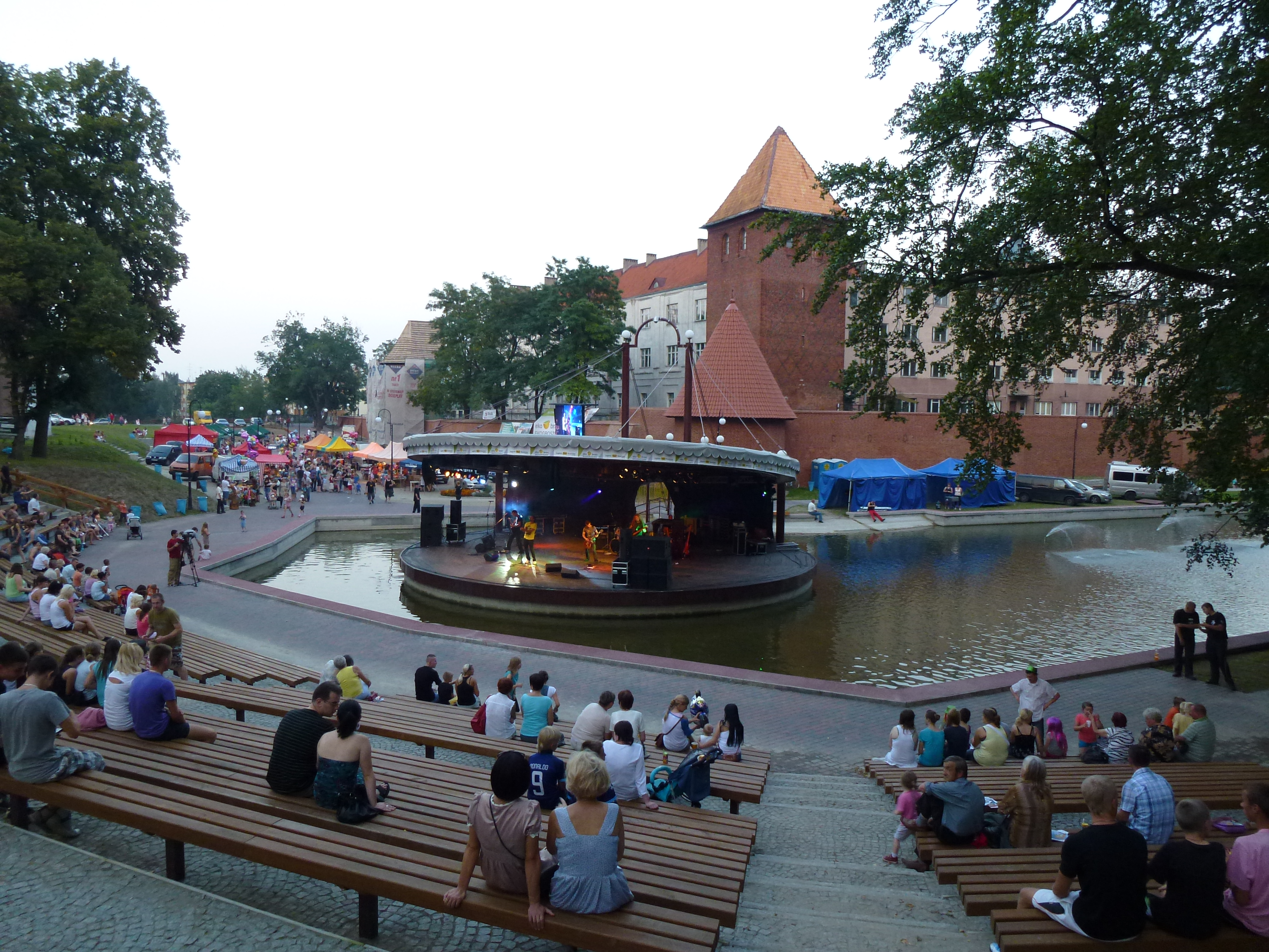 Amfiteatr w Braniewie